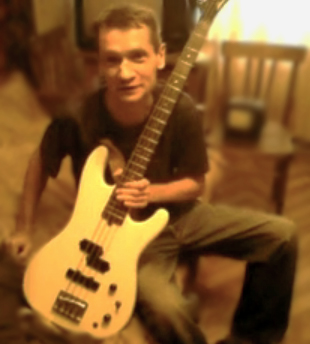 Тупикин Сергей Иванович